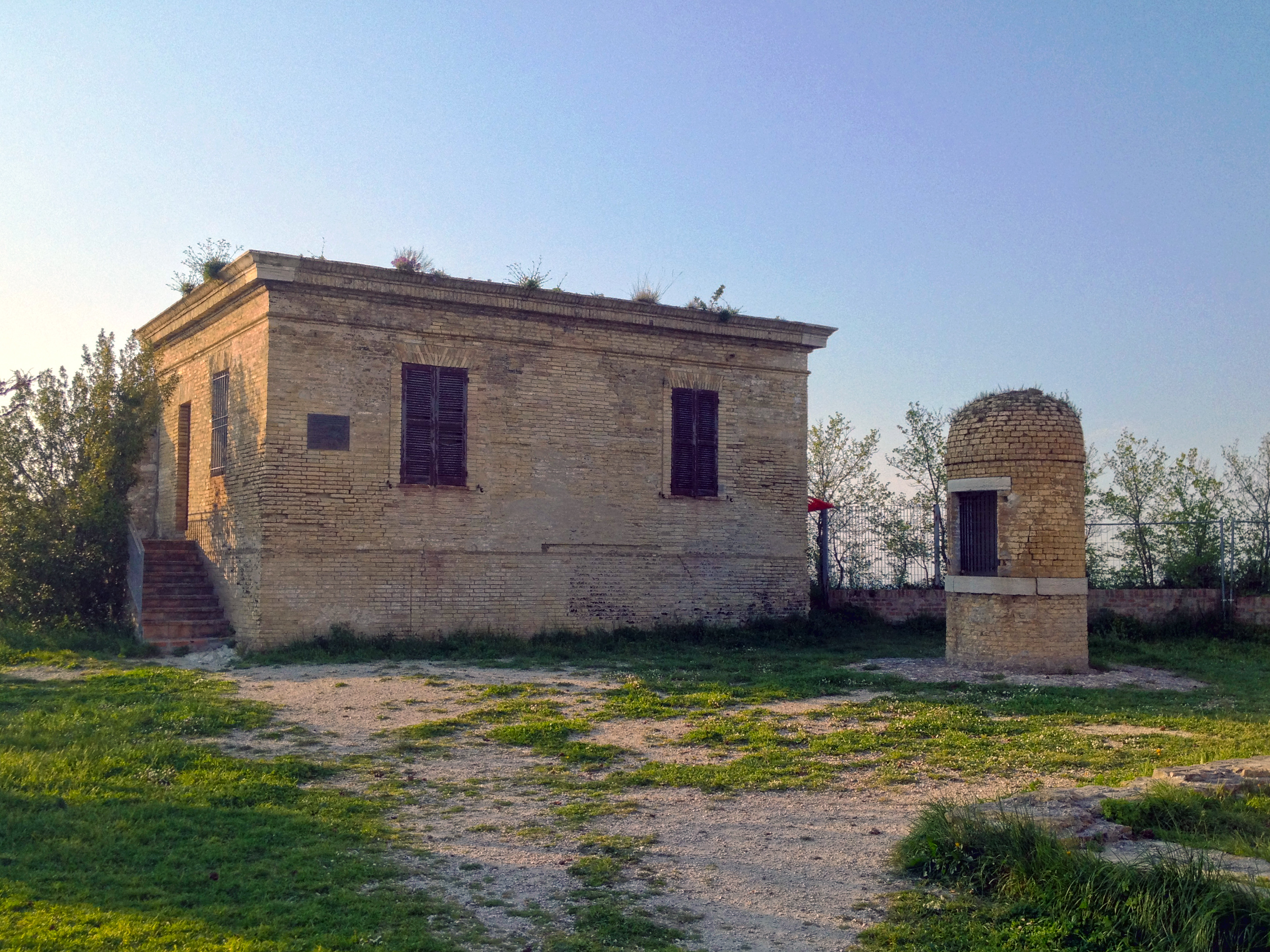 L'edificio che ospita il telegrafo da cui Guglielmo Marconi, nel 1904, fece i primi esperimenti sui segnali radio. Si trova sul colle Cappuccini (Parco del Cardeto), ad Ancona, Italia.